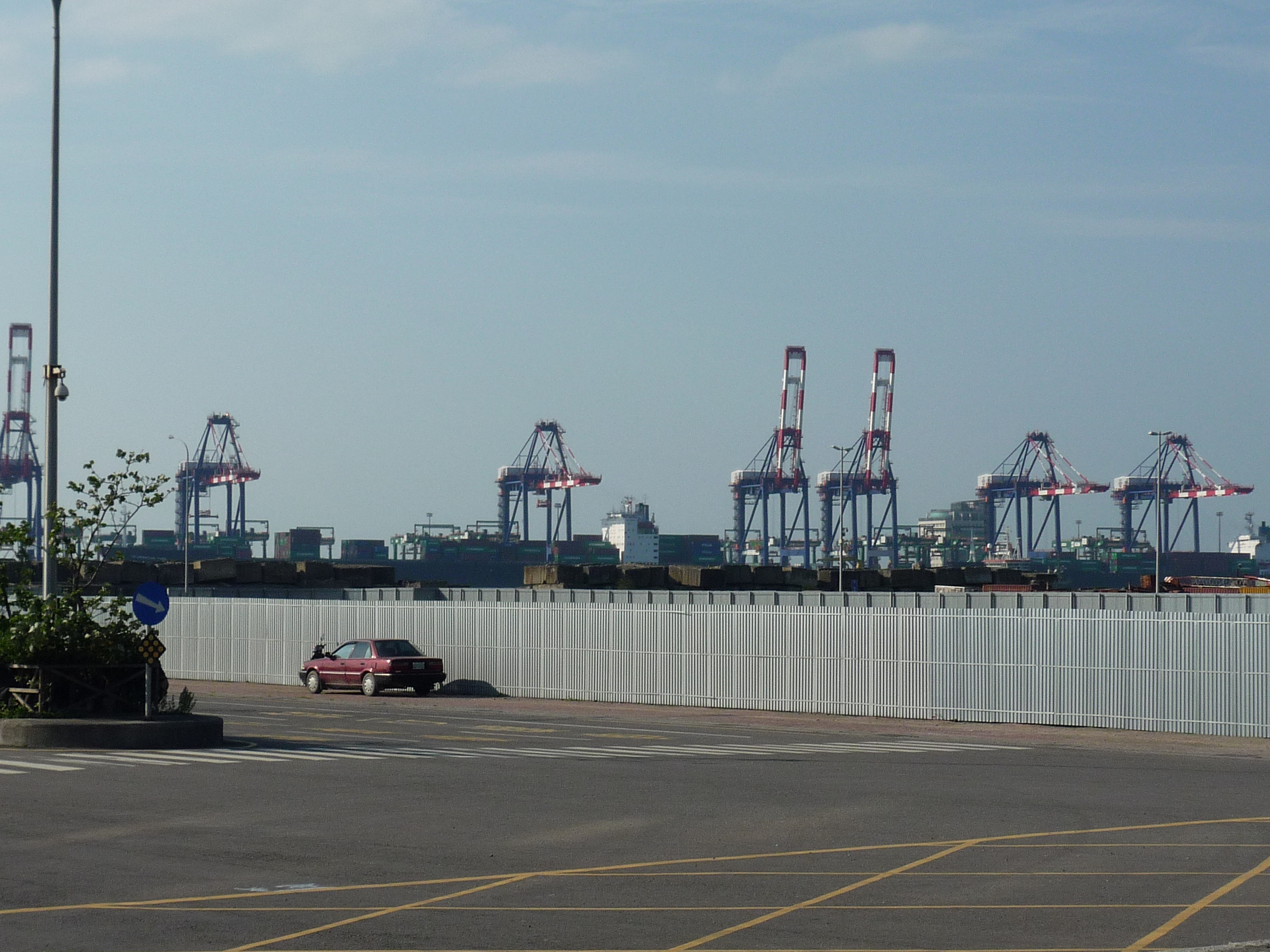 台北港碼頭近照。